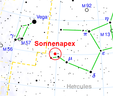 Sonnenapex im Sternbild Hercules